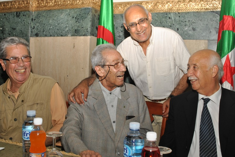 Professeur Bourdaa